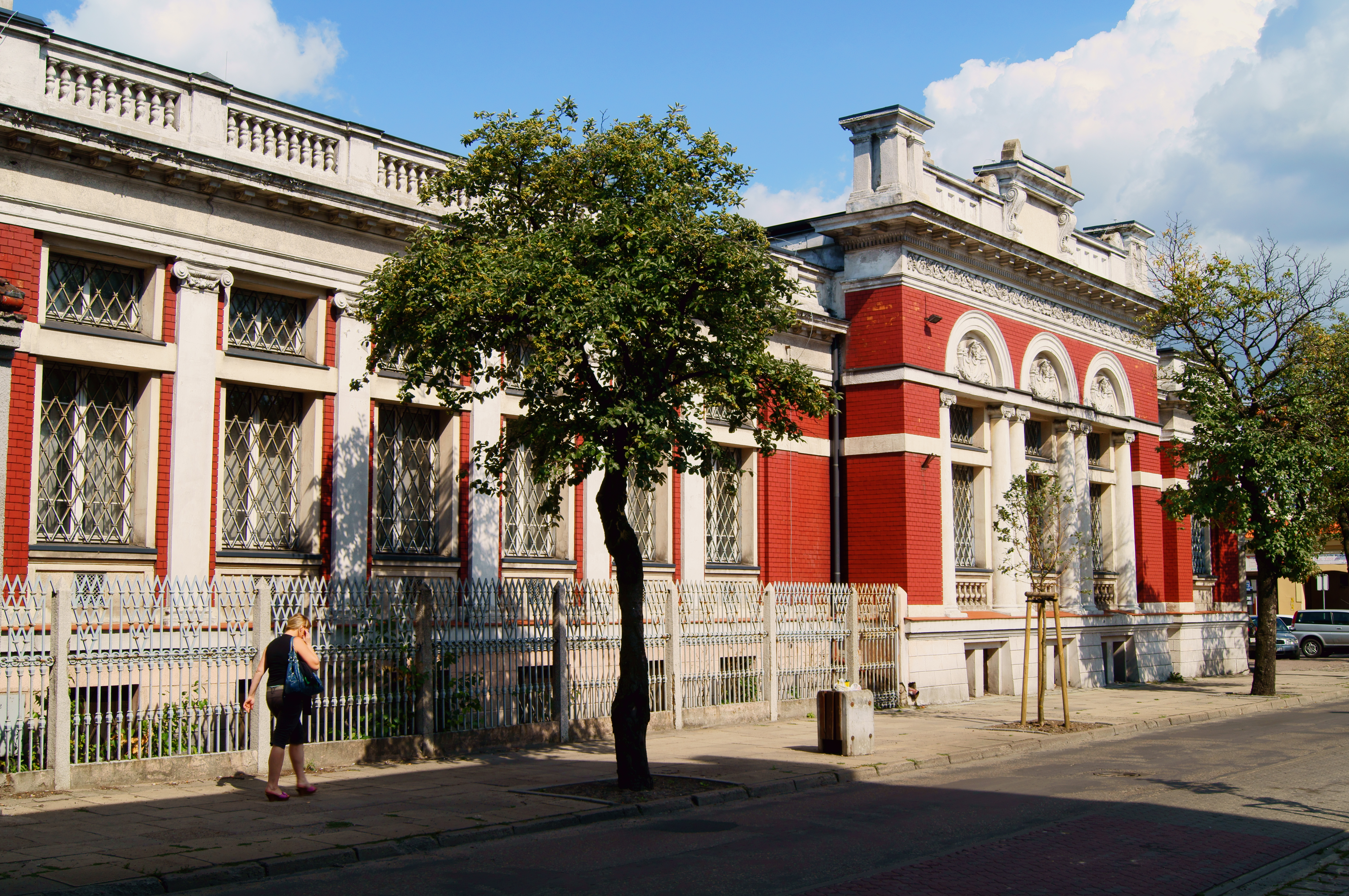 Bank Gospodarstwa Krajowego, 1911 Włocławek, ul. Żabia 2, miasto Włocławek